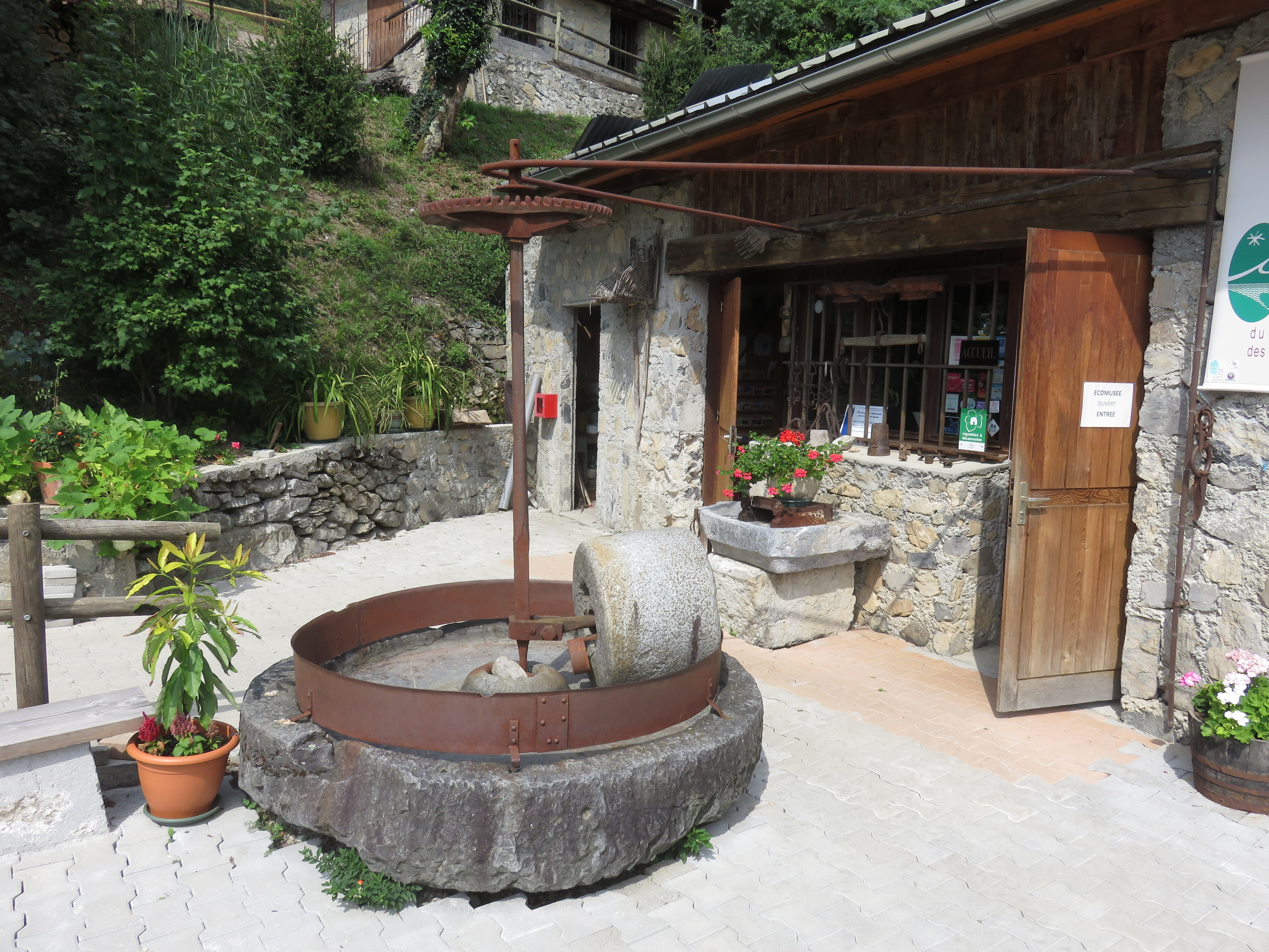 Écomusée de la combe de Savoie